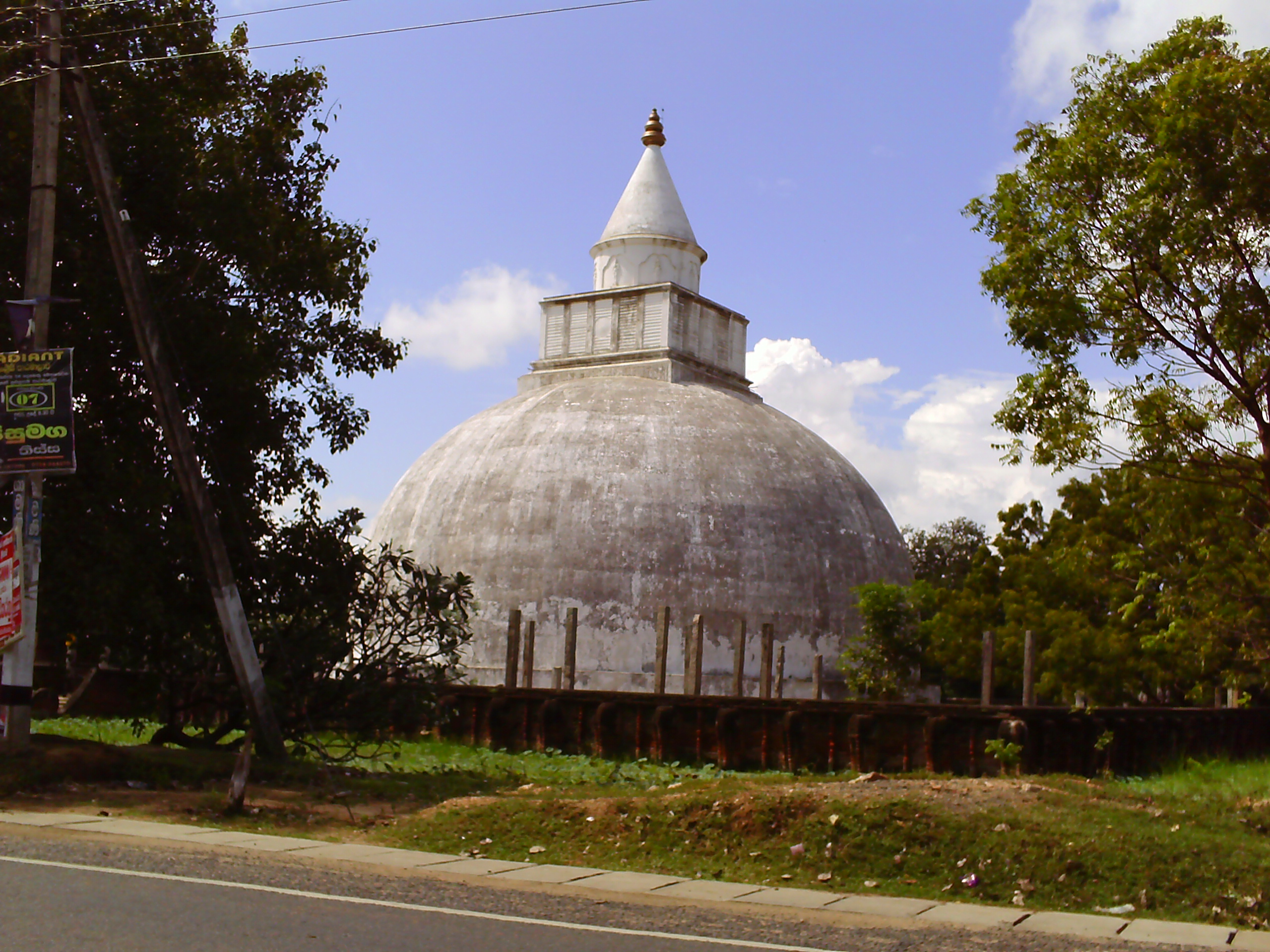 Yatala vehera dagoba at Tissamaharama in south-eastern Sri Lanka.